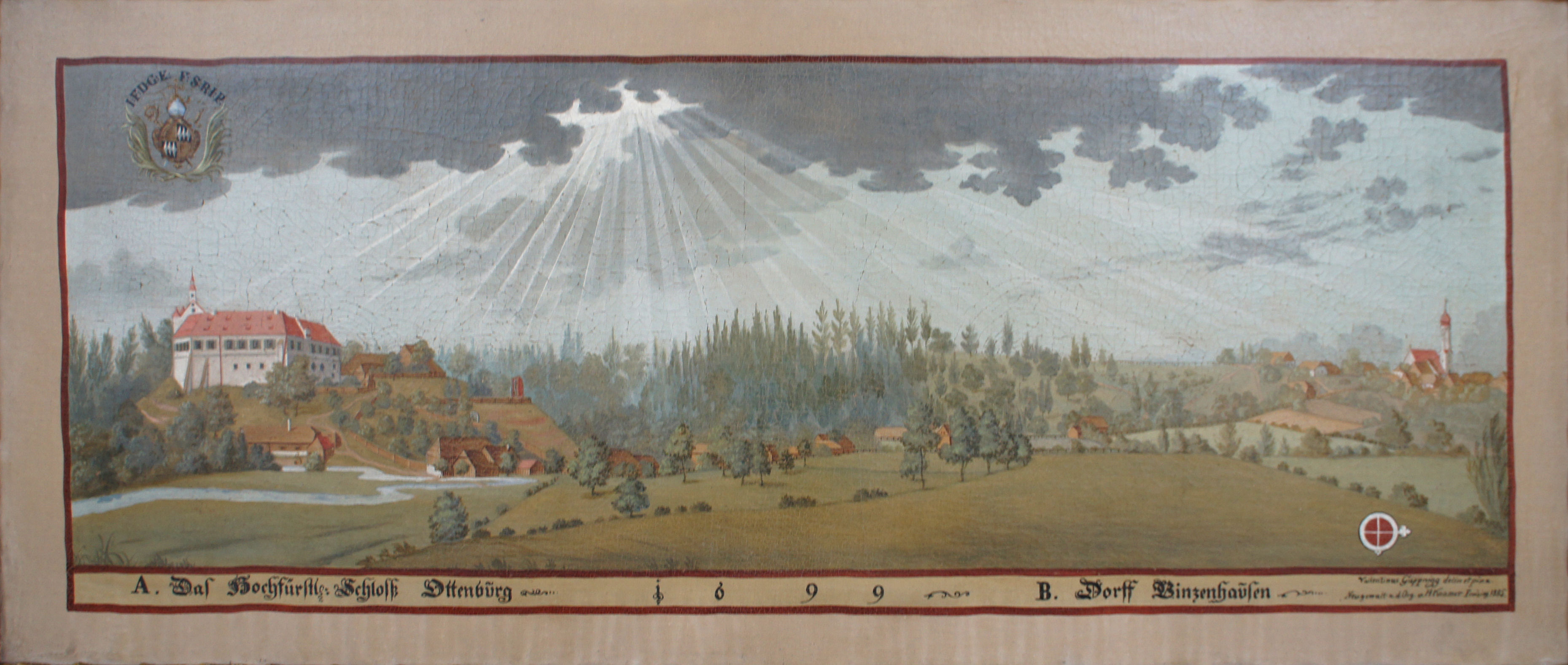 Gemälde aus einer Serie mit Darstellungen von Besitztümern des Hochstifts Freising im Fürstengang zwischen Fürstbischöflicher Residenz und Freisinger Dom.